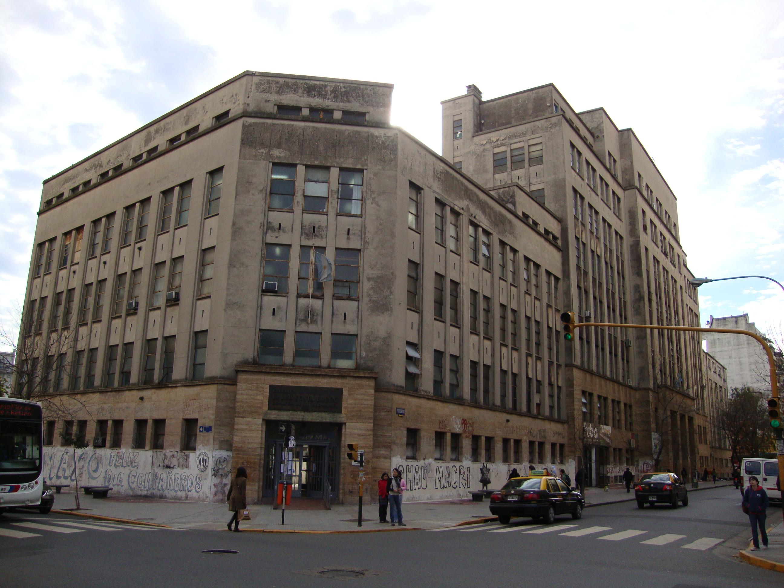 Pabellón Doctor Luis Costa Buero. "Construido gracias a las donaciones de sus hermanos". Parte del conjunto proyectado por el arquitecto Rafael Sammartino para la Facultad de Medicina de la Universidad de Buenos Aires. Actual sede de la Federación Universitaria (Uriburu 920), sede de UBA XXI y otras dependencias (Uriburu 950) y de la Facultad de Ciencias Sociales (Marcelo T. de Alvear 2230). Buenos Aires, Argentina.